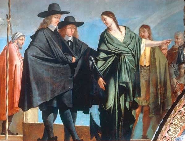 Detail: Zwei Männer mit Personifikation einer Tugend